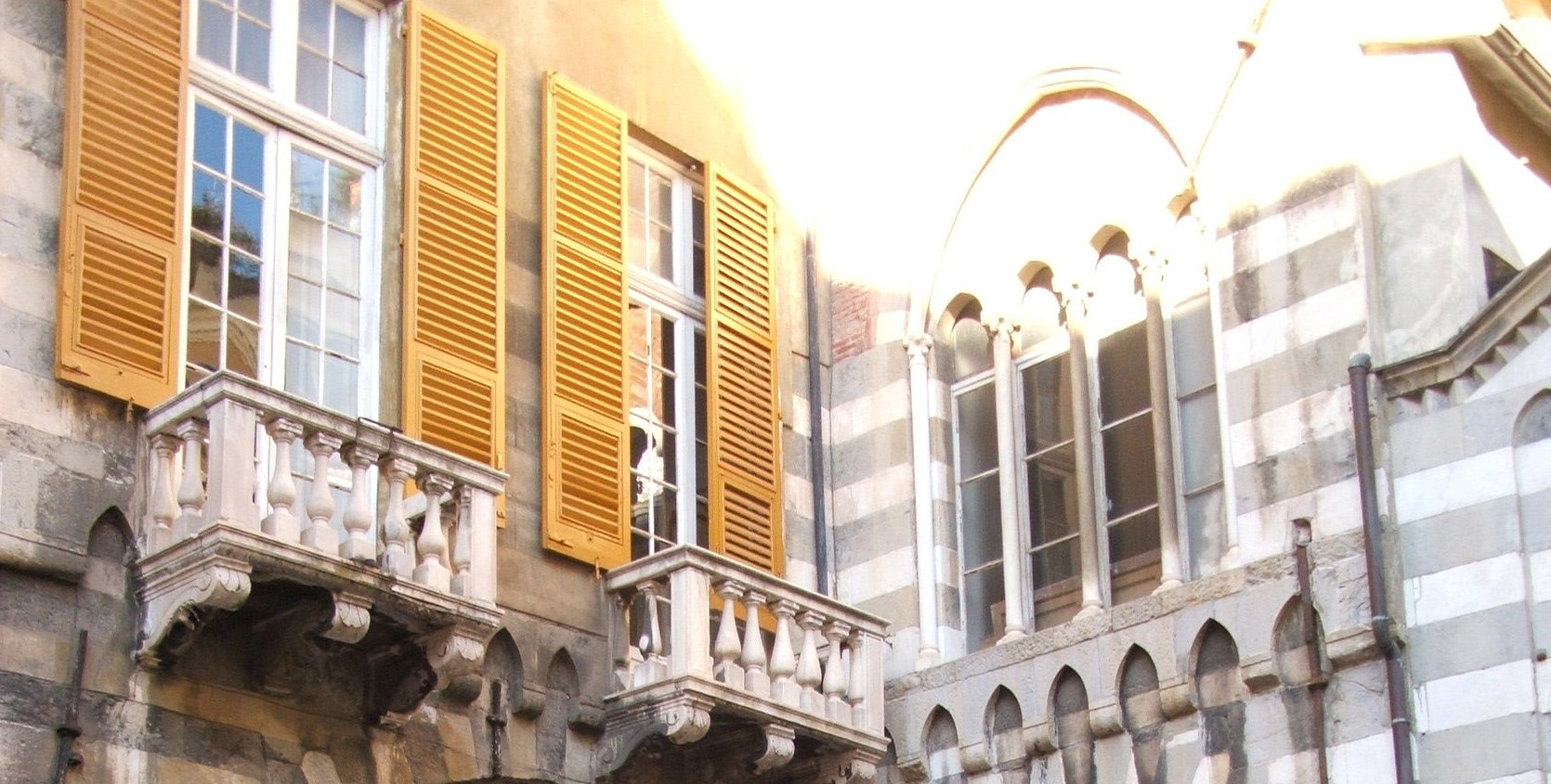 Immagine da Genova Polifore di una delle "Case dei Doria" a Genova.